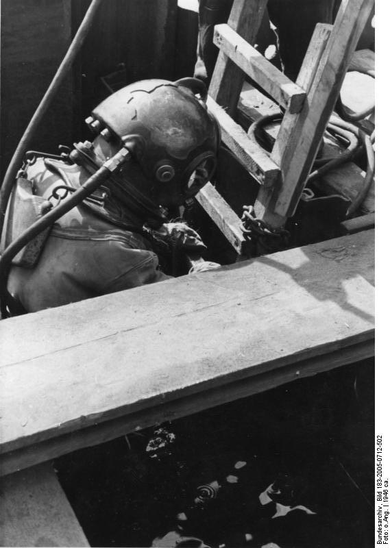 Berlin, Taucherarbeiten Kulturleben in Berlin um 1946. Die letzten Lücken im Berliner U- und S-Bahn-Netz werden geschlossen. Taucherarbeiten im gesprengten und überschwemmten Spree-Kanal. Information added by Wikimedia users.Surface-supplied diver wearing Dräger "Bubikopf" helmet.